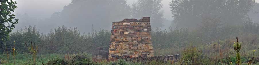 Situatie herfst 2012